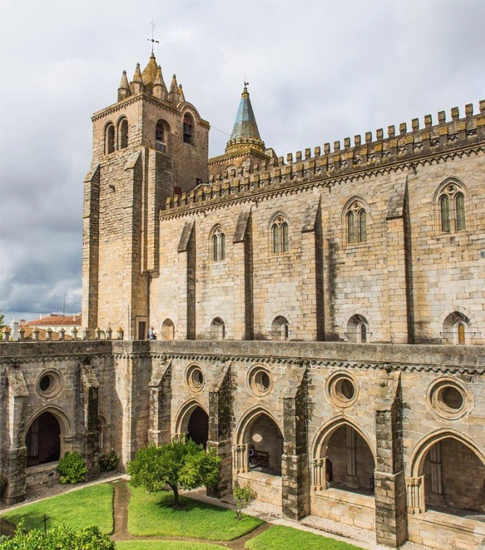 Catedral de Évora